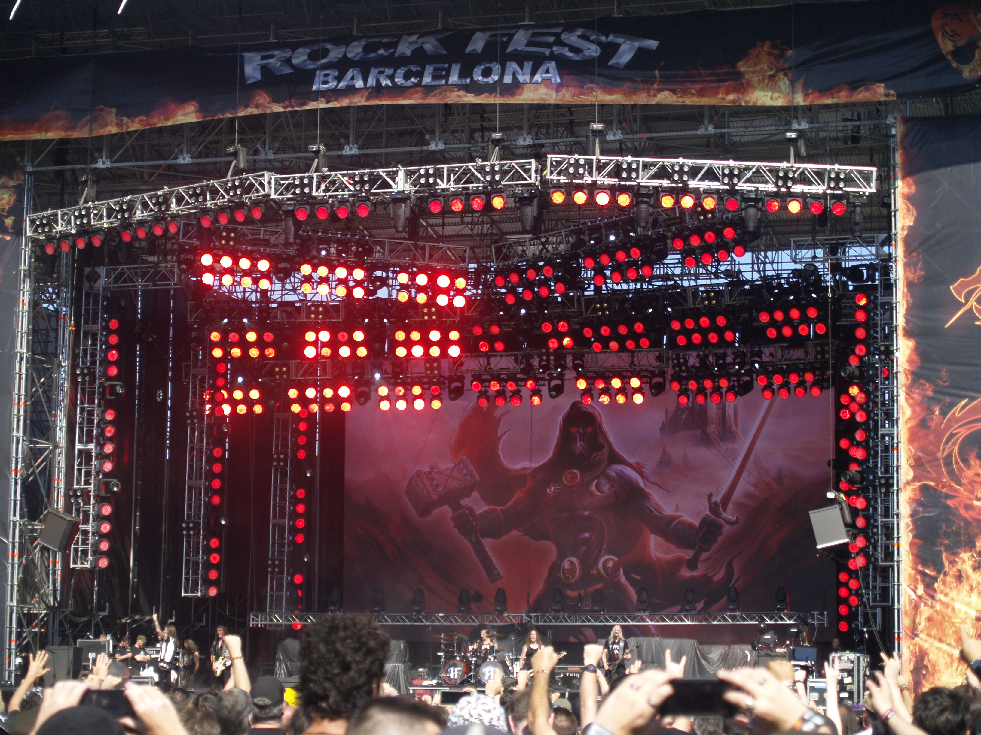 Barcelona Rock Festival 2017 - Hammerfall